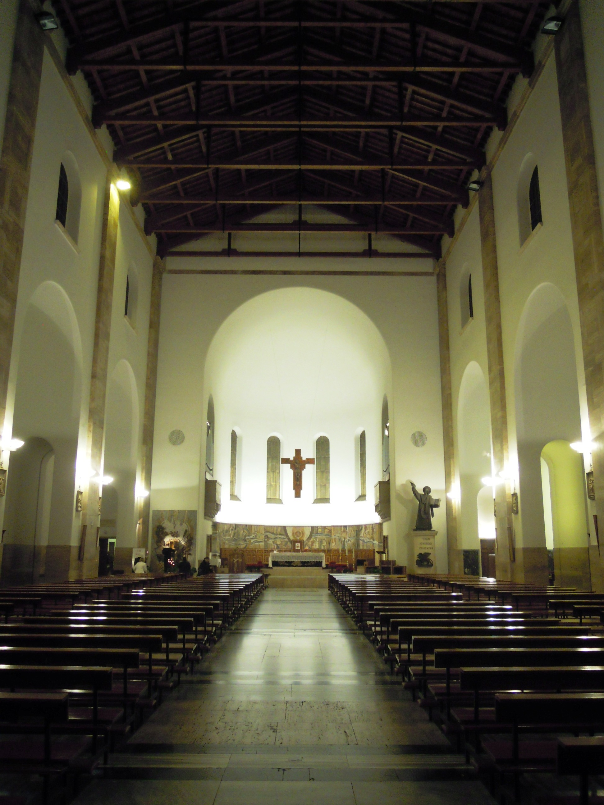 L'interno della cattedrale di San Marco in Latina